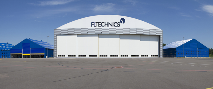 FL Technics angaras Kauno oro uoste